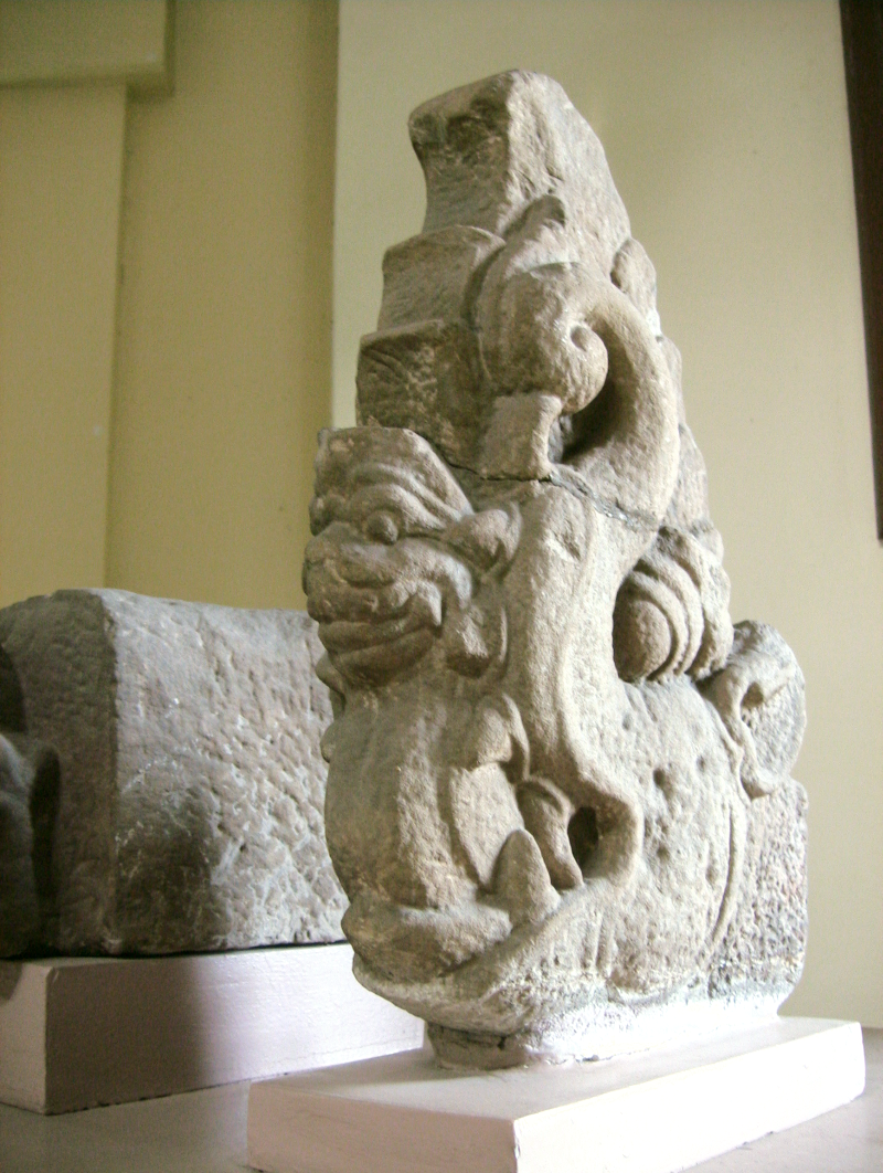 Mảnh kiến trúc trang trí Rắn Thần Naga, thế kỷ 10, Trà Kiệu. A fragment of a tower designed with Naga, the Cham god snake.